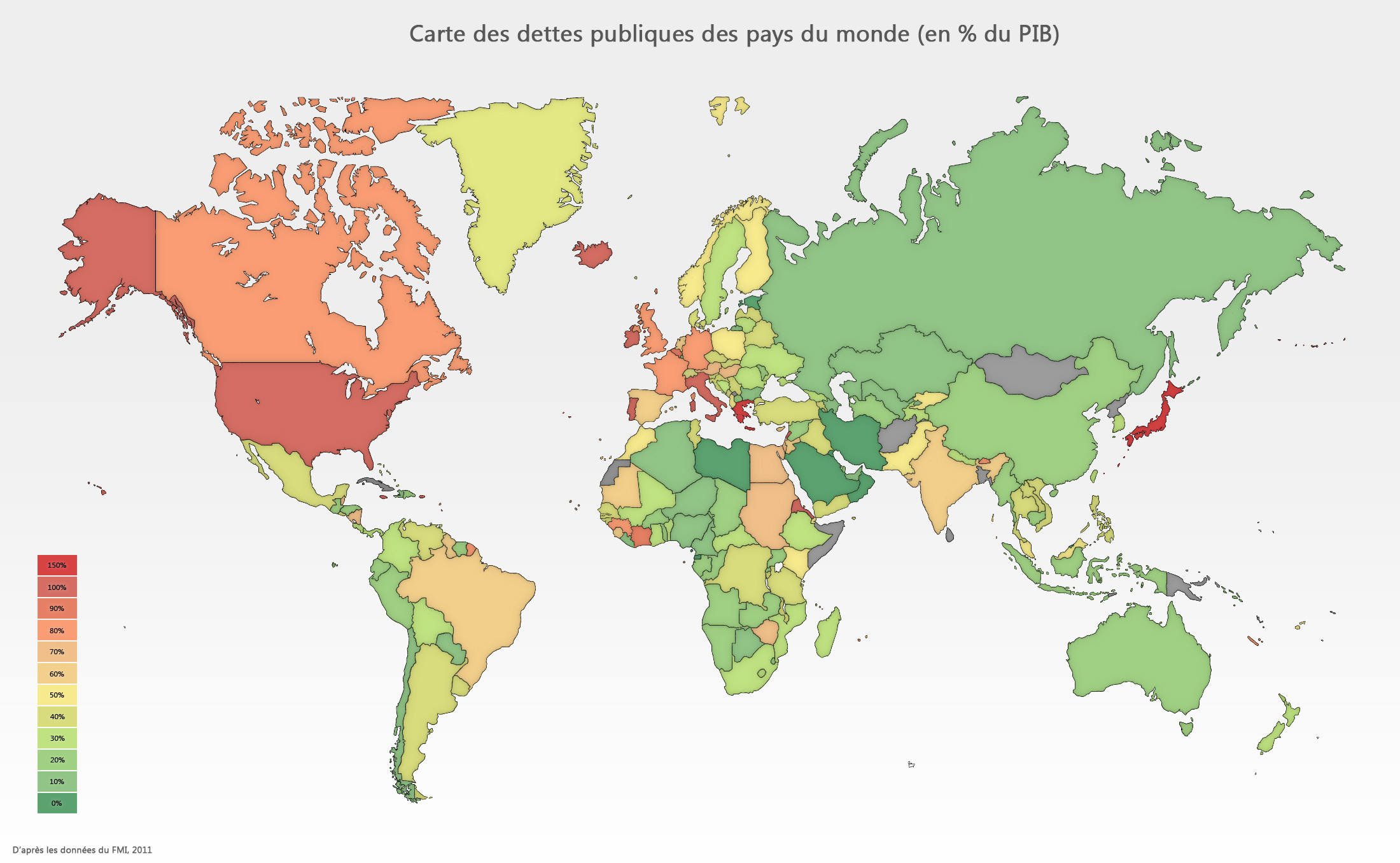 Carte de la dette publique des pays du monde en 2011 (en % du PIB).png